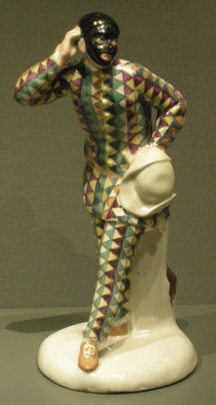 Ngv, manifattura di kloster veilsdorf, arlecchino, 1770 circa